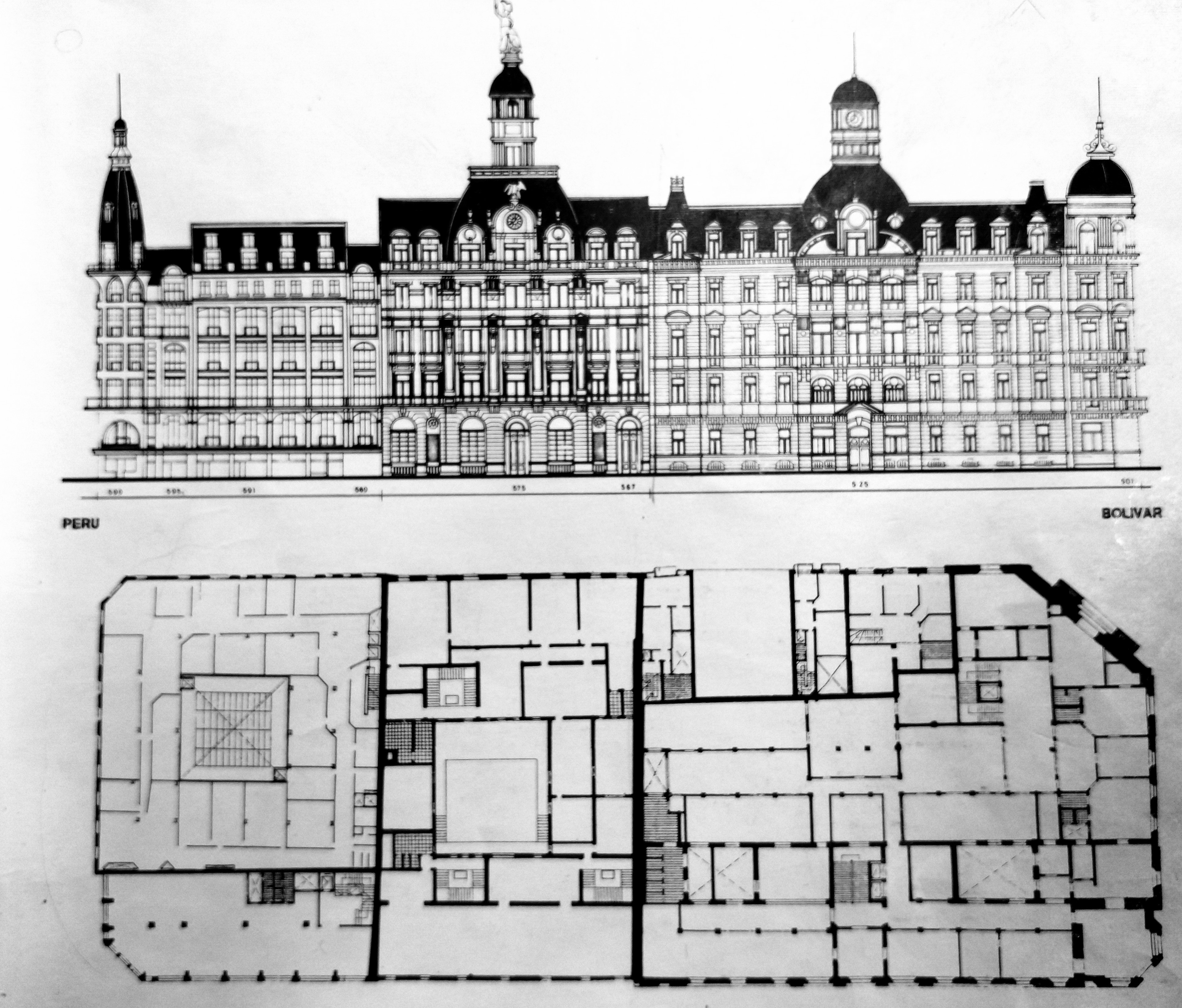 Loteo de la cuadra tomada desde Perú hasta Bolivar, alturas y detalles de ornamentación afrancesada de los diferentes esdificios, planta y tipología de cada uno.